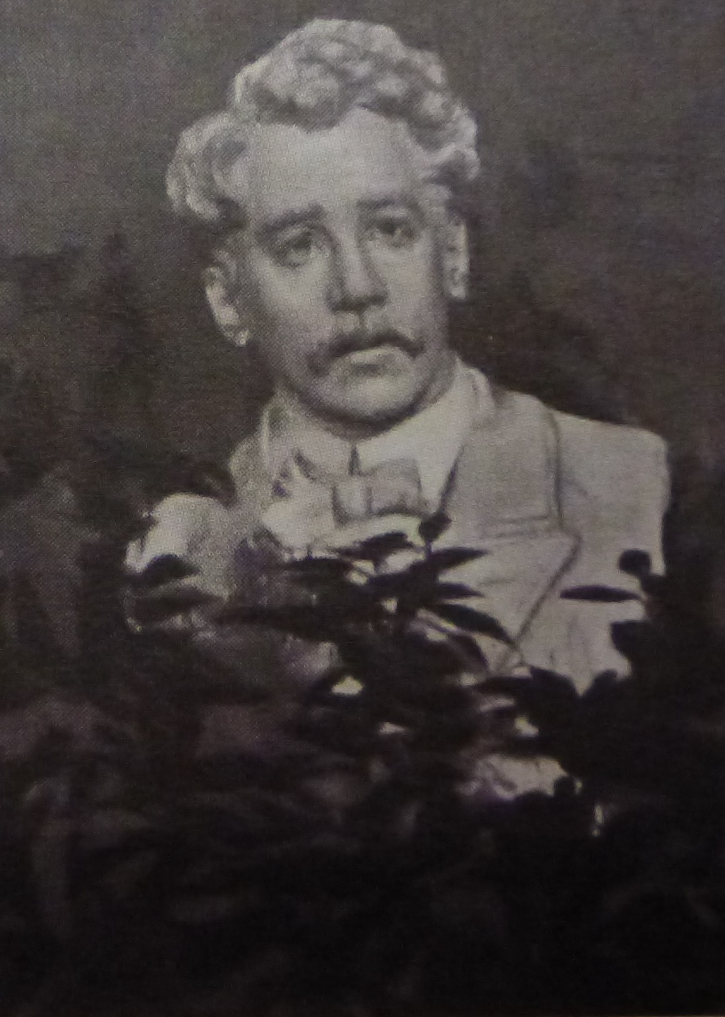 Адель Вернер портрет Николая Дмитриевича Прокофьева 1913 год